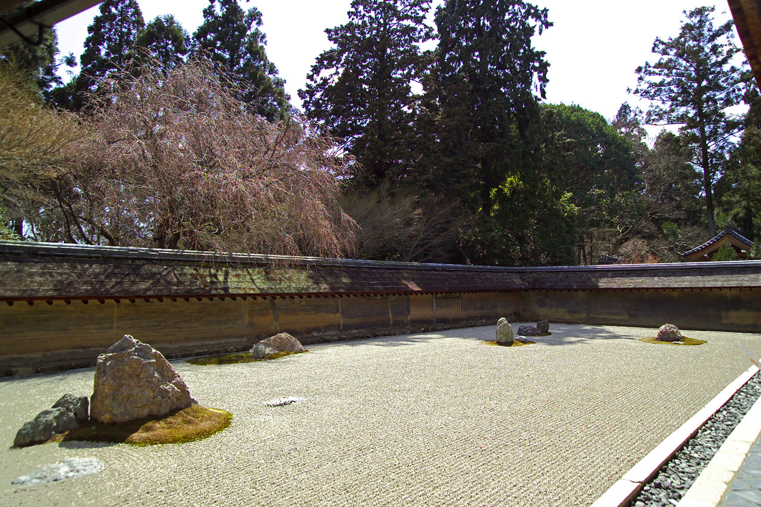 This is the dry garden (karesansui, karesensui, kosansui, kosensui) at Ryōan-ji, a Buddhist temple in Kyoto, Japan. 龍安寺の方丈庭園（枯山水）